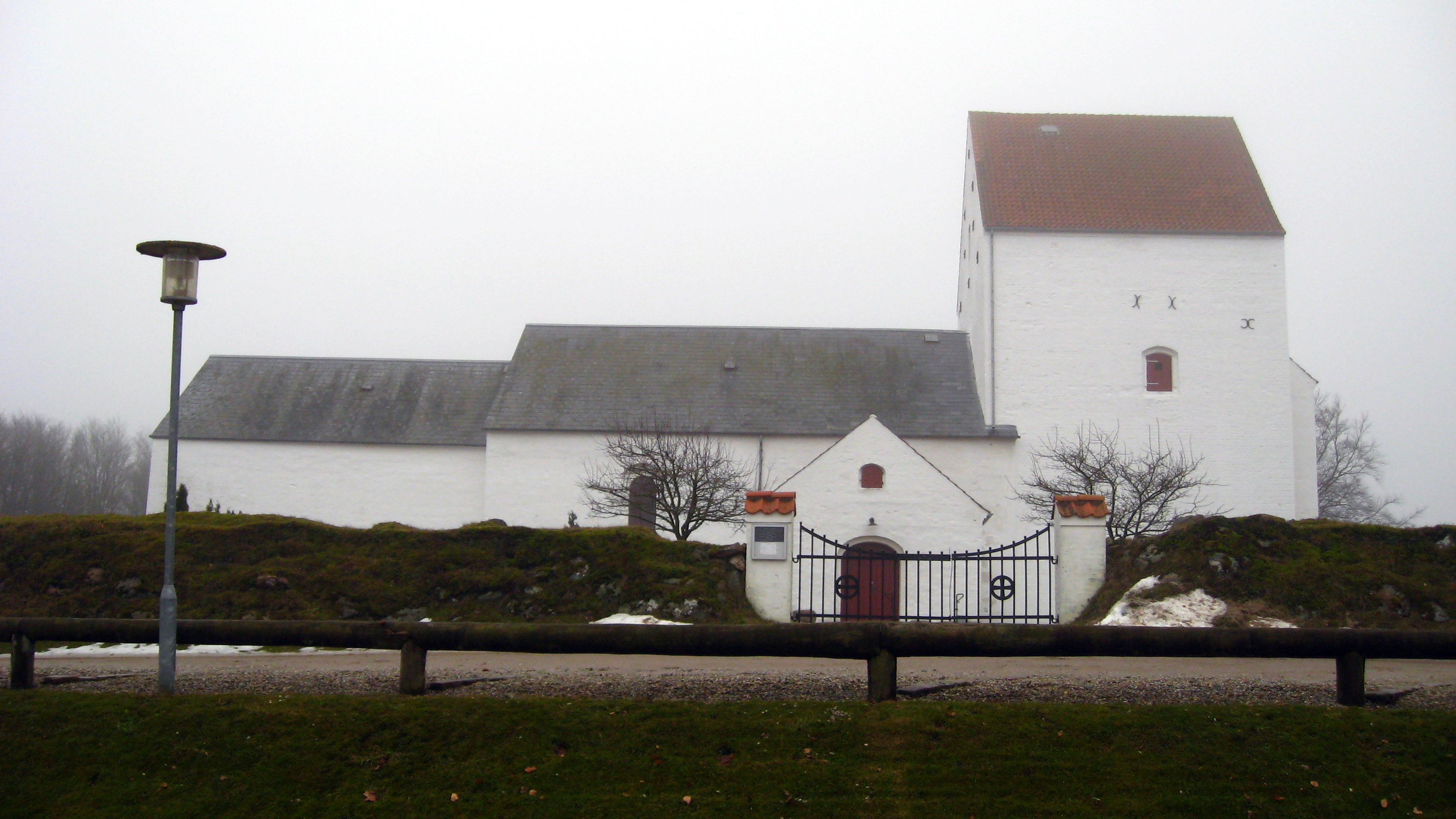 Tise Kirke (også lokalt Thise Kirke) er en kirke i Tise Sogn, Ålborg stift. Den ligger i Vendsyssel, Brønderslev Kommune i Region Nordjylland.